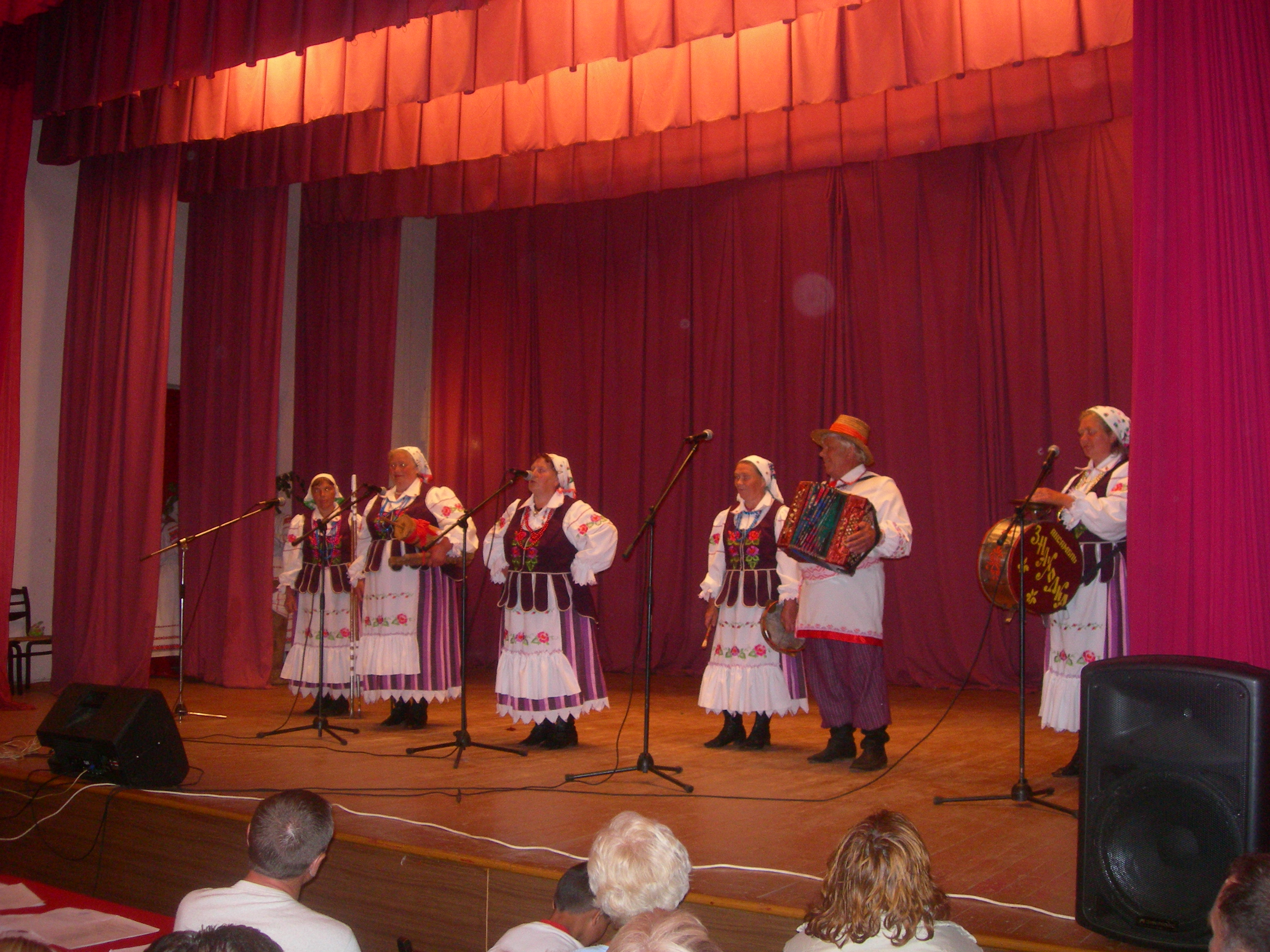 "Sporovskyji Smichovysky" folk humour festival in Sporava, Belarus